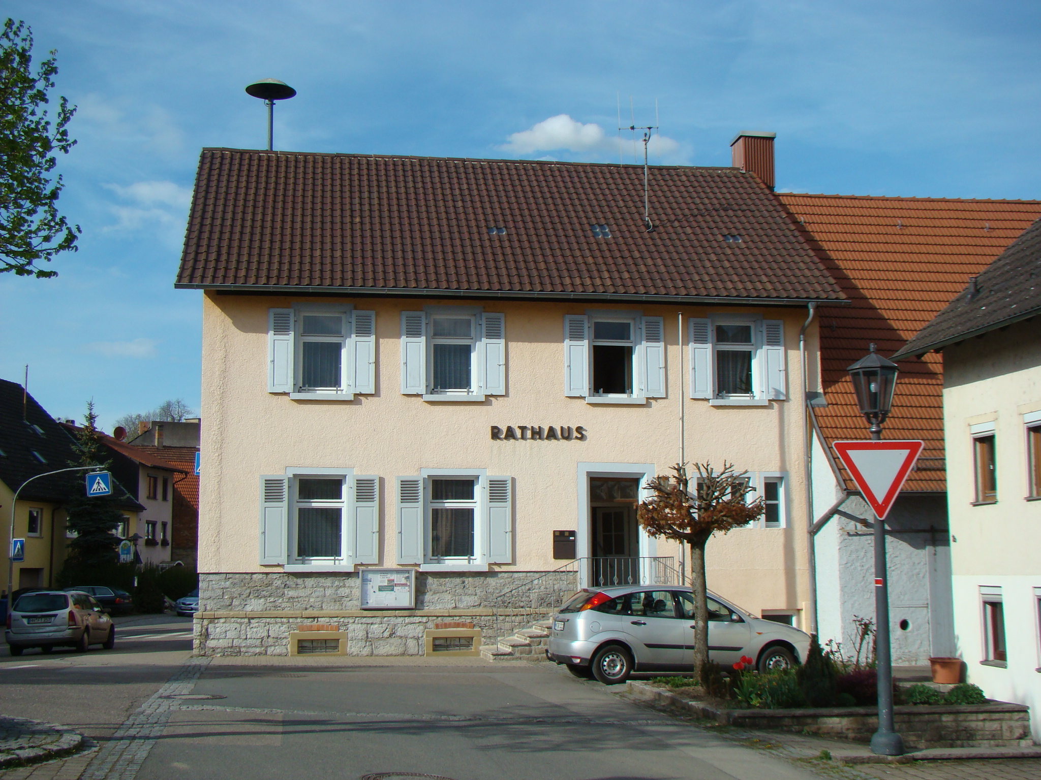 Altes Rathaus in Neudenau-Herbolzheim